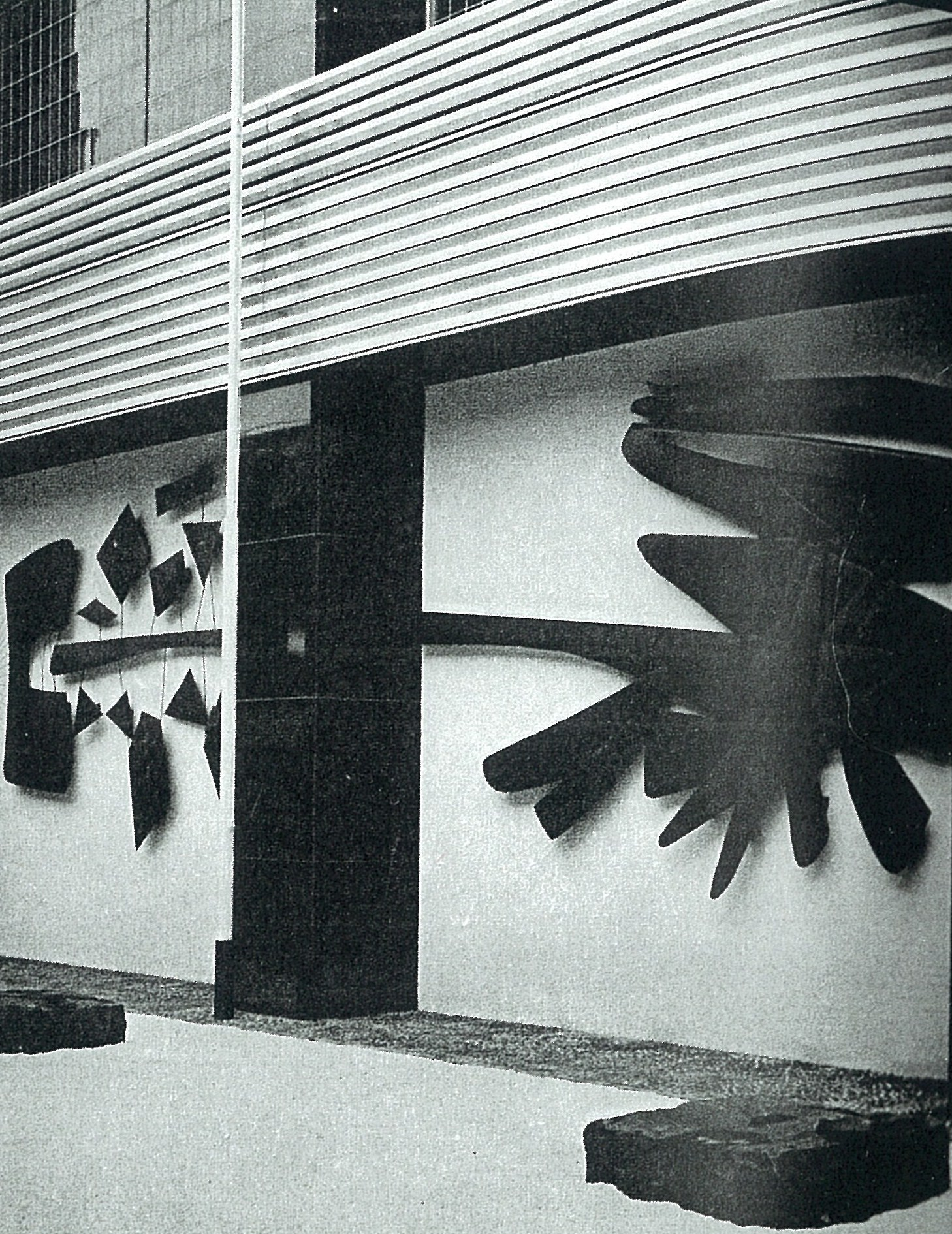 新潟県長岡市に1964年から1979年まで存在した長岡現代美術館長岡現代美術館の建物側面にある斎藤義重によるレリーフ